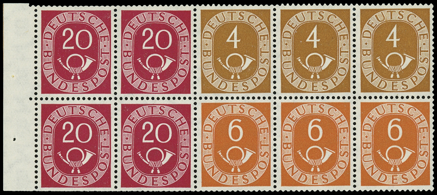 Information: Erstes Markenheftchen der BRD Ausgabepreis: Heftchenpreis: 250 Pfennig First Day of Issue / Erstausgabetag: 30. Oktober 1951 Auflage: 750.000 Entwurf: Druckverfahren: Michel-Katalog-Nr: Ländercode-MiNr: H-Blatt 1